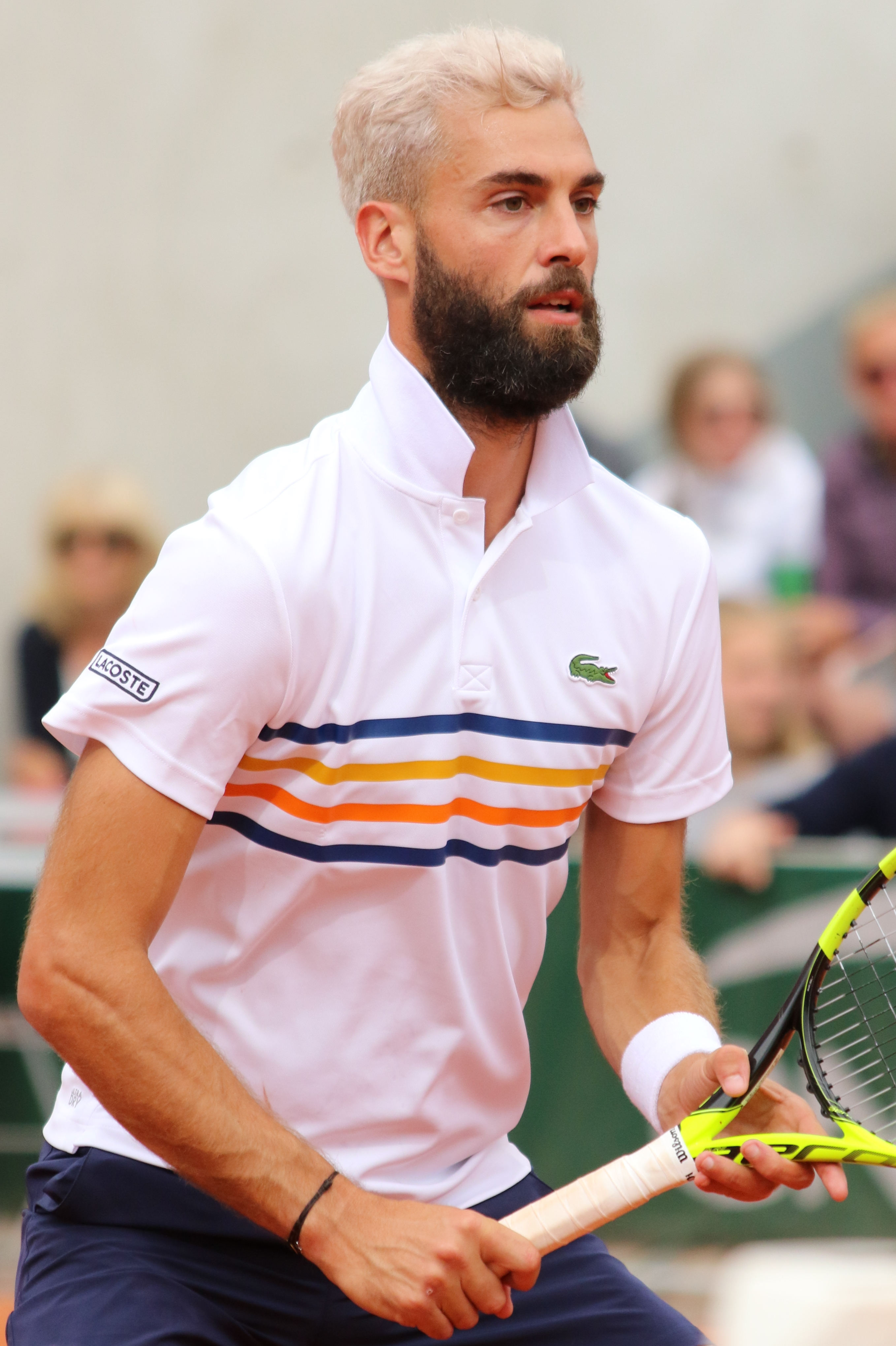 Paire RG18 (52)